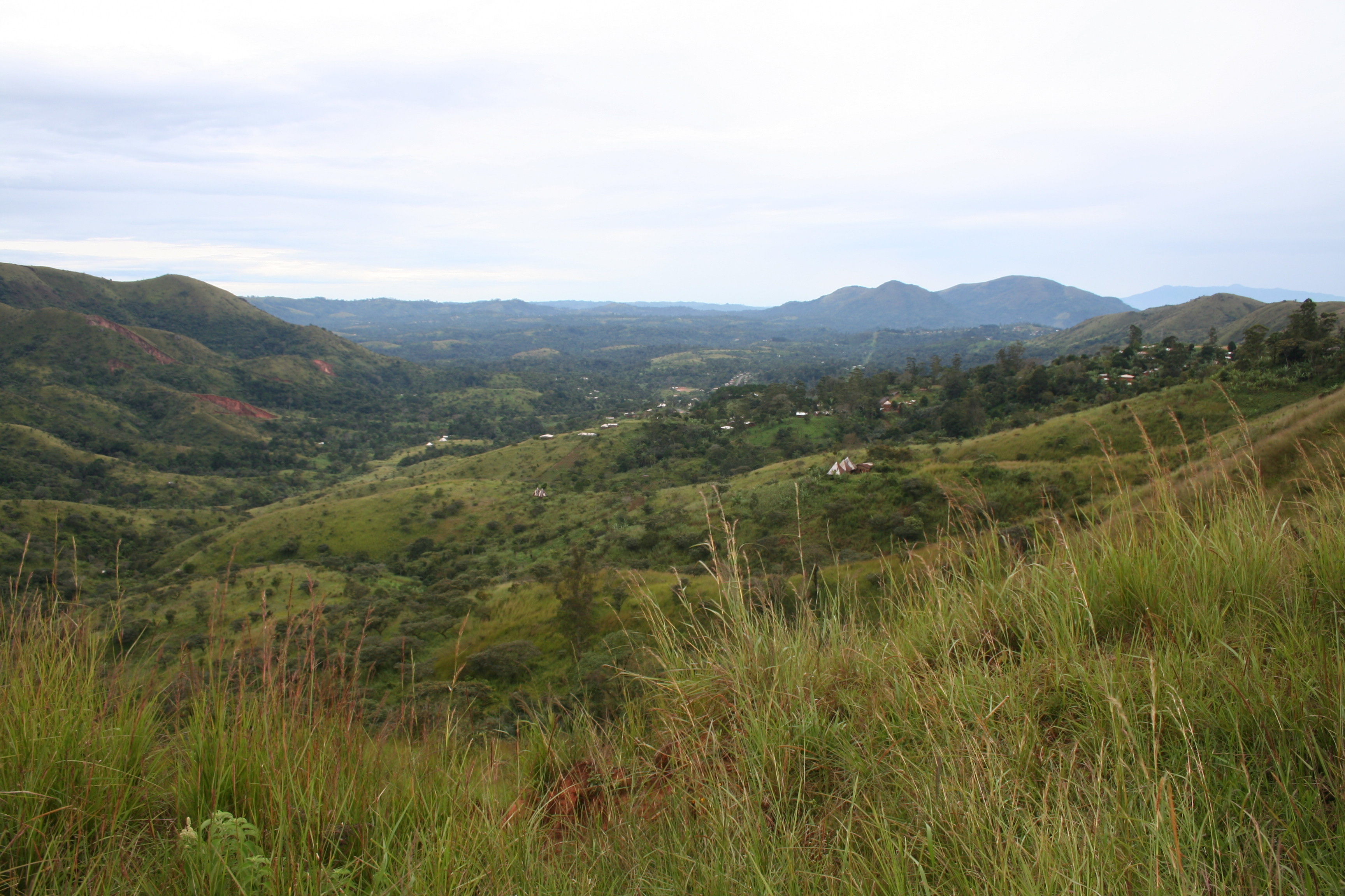 Succession de montagne à Batié au lieu dit "Col Batié" à l'ouest Cameroun